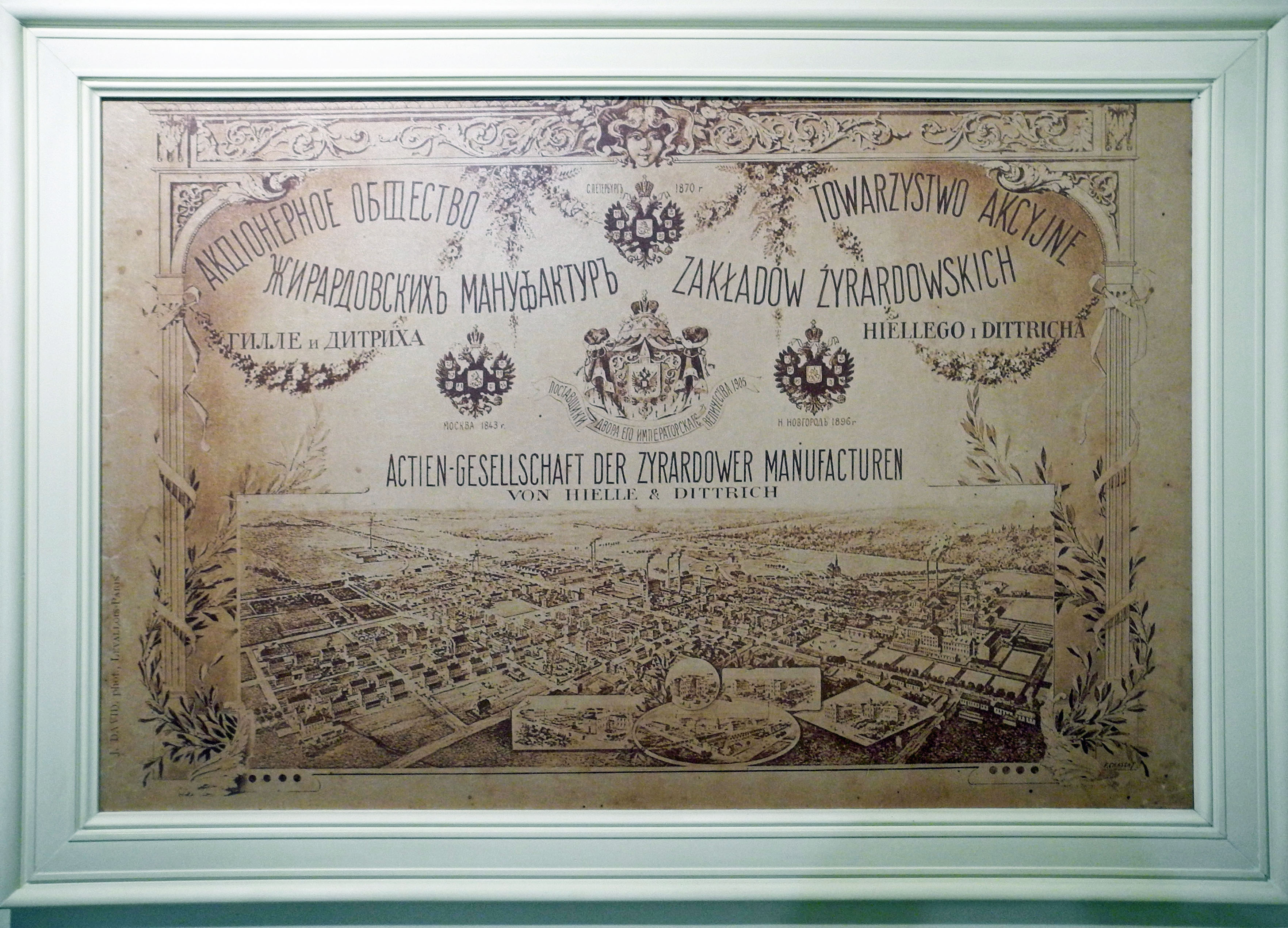 Alte Aktie der ehem. Firma Hielle & Dittrich in Żyrardów